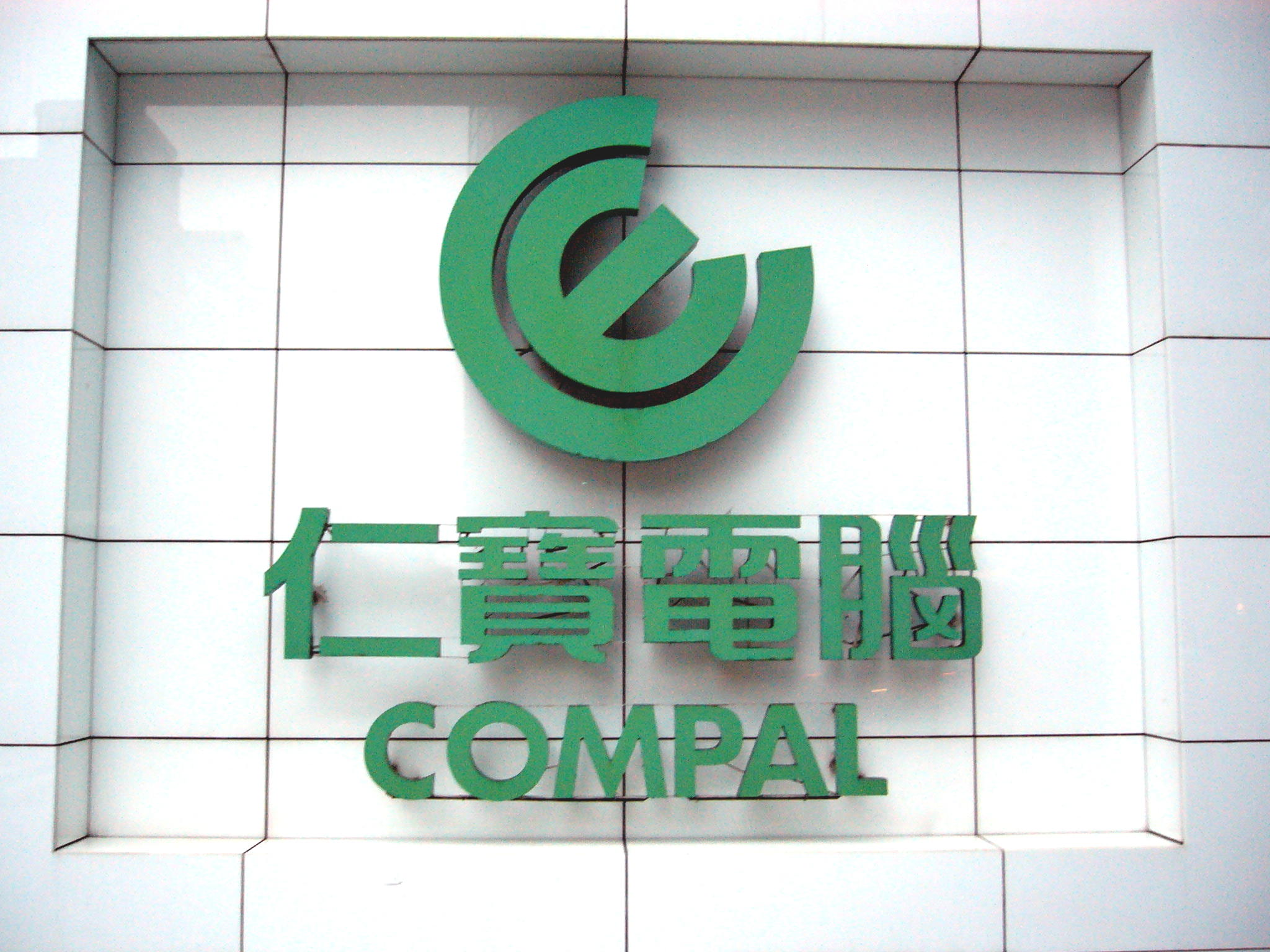 仁寶電腦總部商標牆。